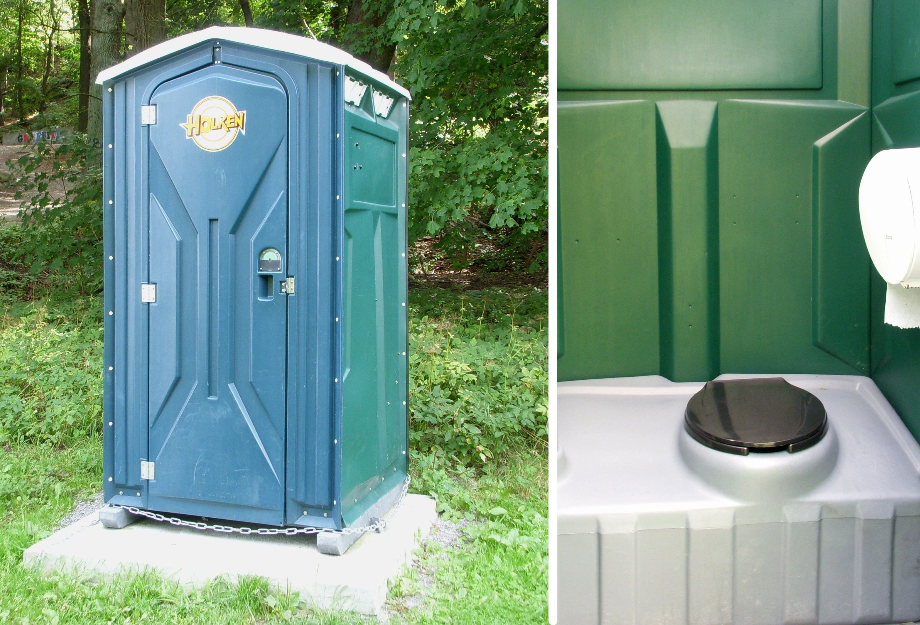 Flyttbar toalett av typ "Holken" vid strandbad Ulvsundasjön, utsidan och insidan